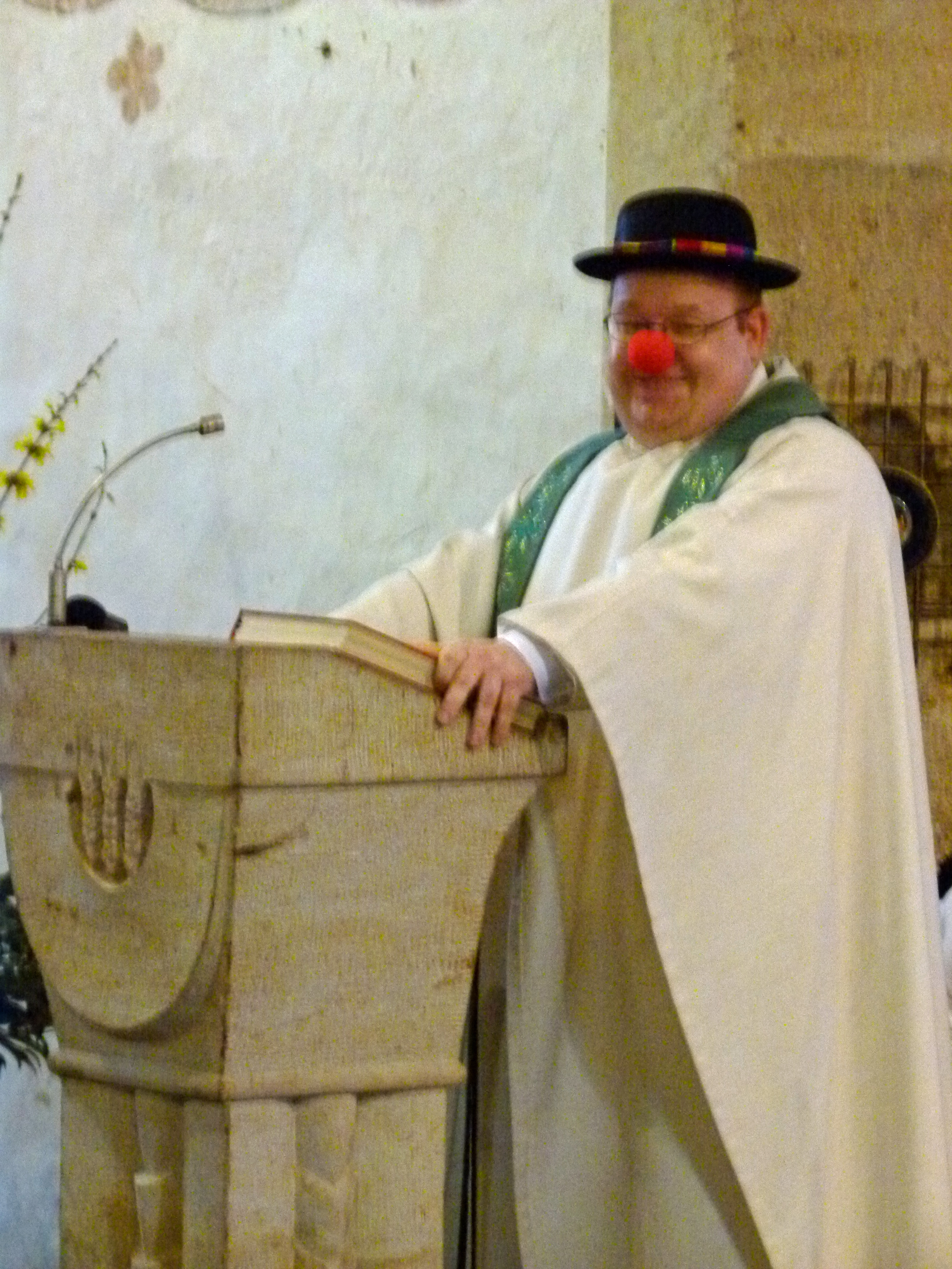 Der Herr Pfarrer